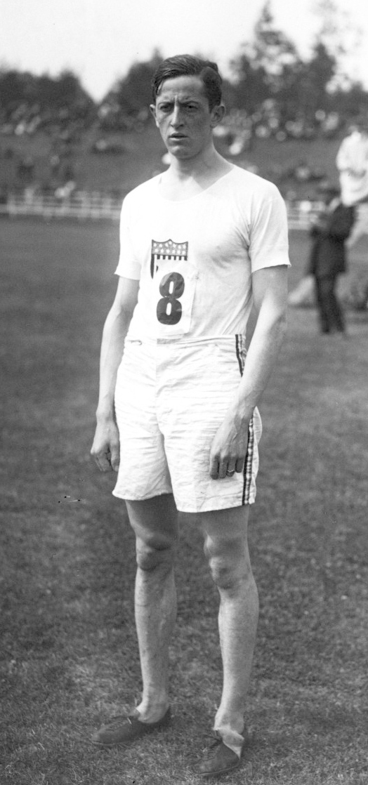 23-7-12, Reims, James Rosenberg, américain, 100 et 200 mètres [portrait] : [photographie de presse] / [Agence Rol]